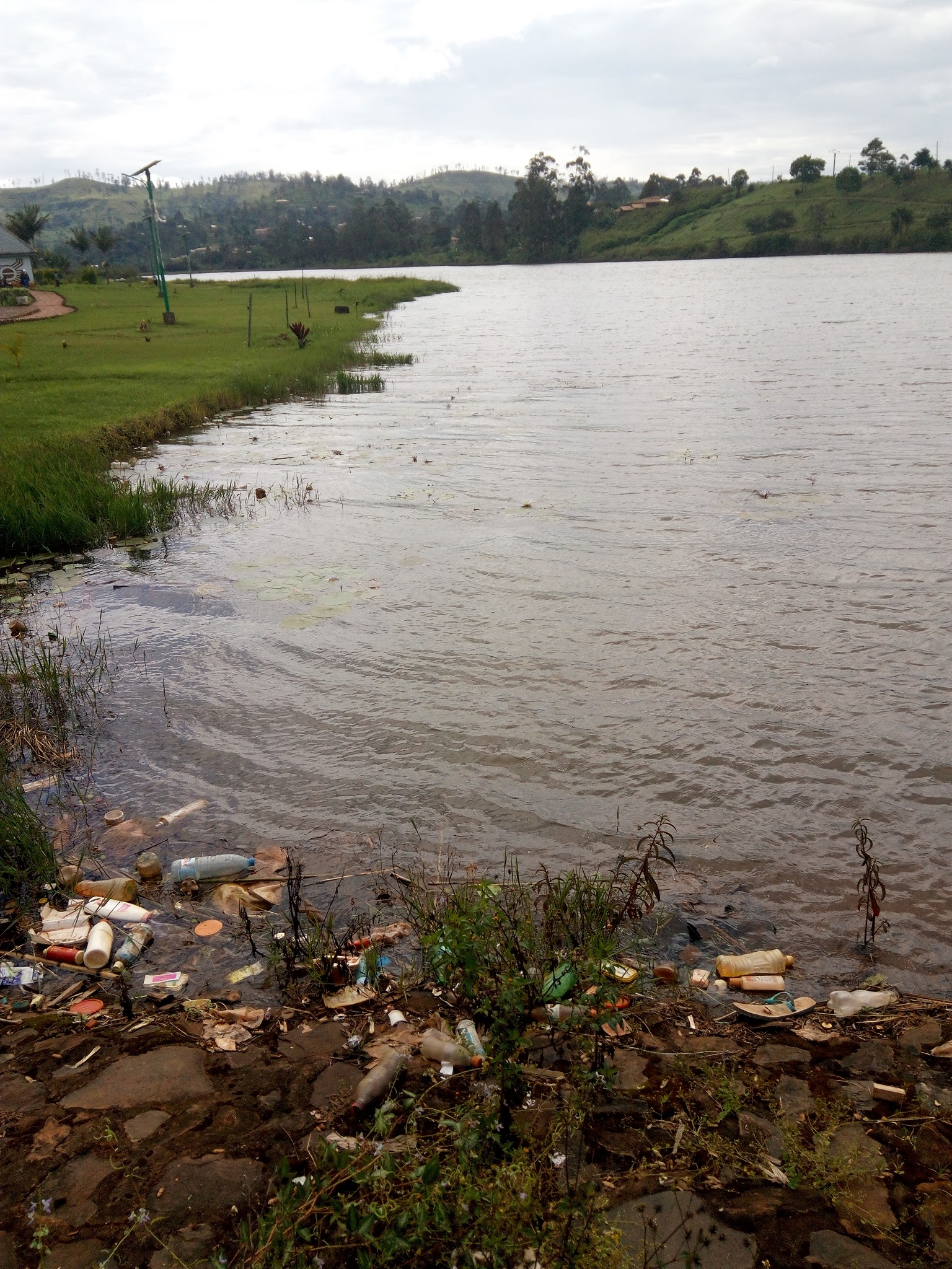 Ici le Lac Municipal de Dschang est victime de l'activité humaine. La Communauté Urbaine ne se donne pas la peine d'aménager ses alentours, l'abandonne aux populations locales qui s'y livrent à la pratique des cultures vivrières, déversant ainsi les déchets issus de leur activité dans l'eau. Pourtant un lac chargé d'espoir pour tout un pays, compte tenu du projet de développement des sports nautique qui tourne autour et de celui du Musée des Civilisations.